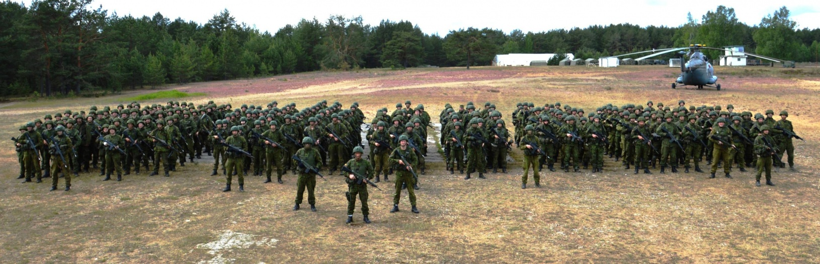 KASP 2R pratybos